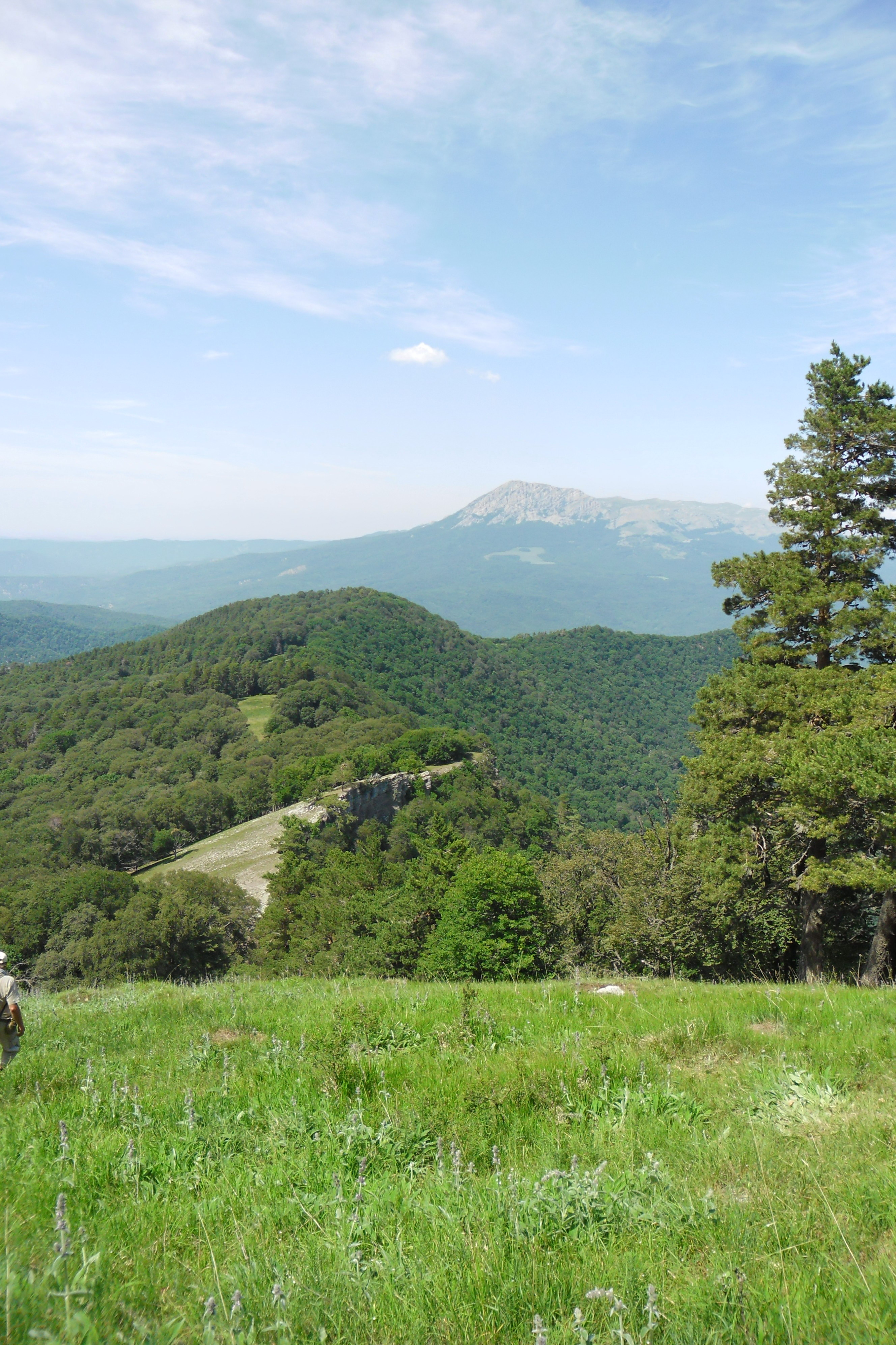 Коник: Фото